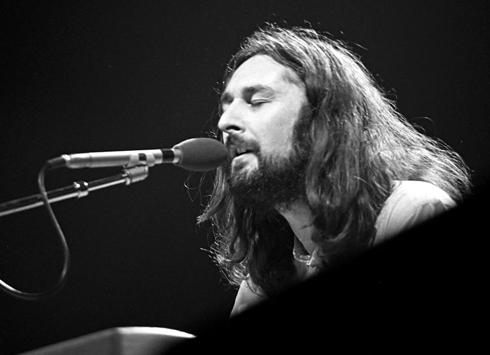 Rick Davies (Supertramp) en concert à Zürich en 1979.